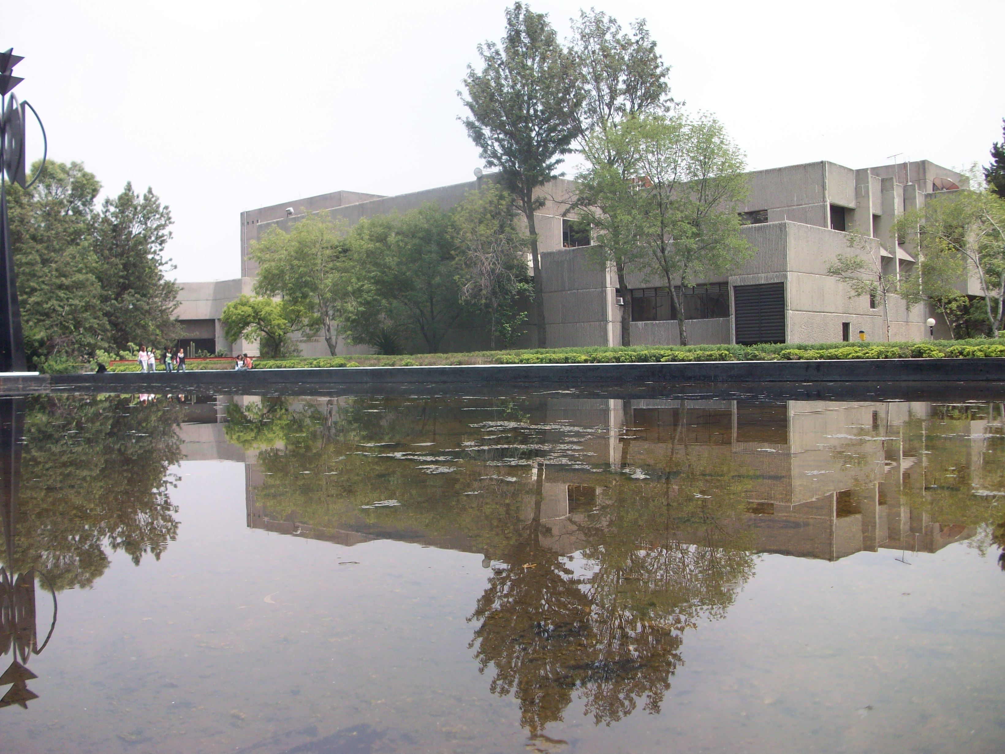 Edificio de la Coordinación de Difusión Cultural y Sala José Revueltas.jpg